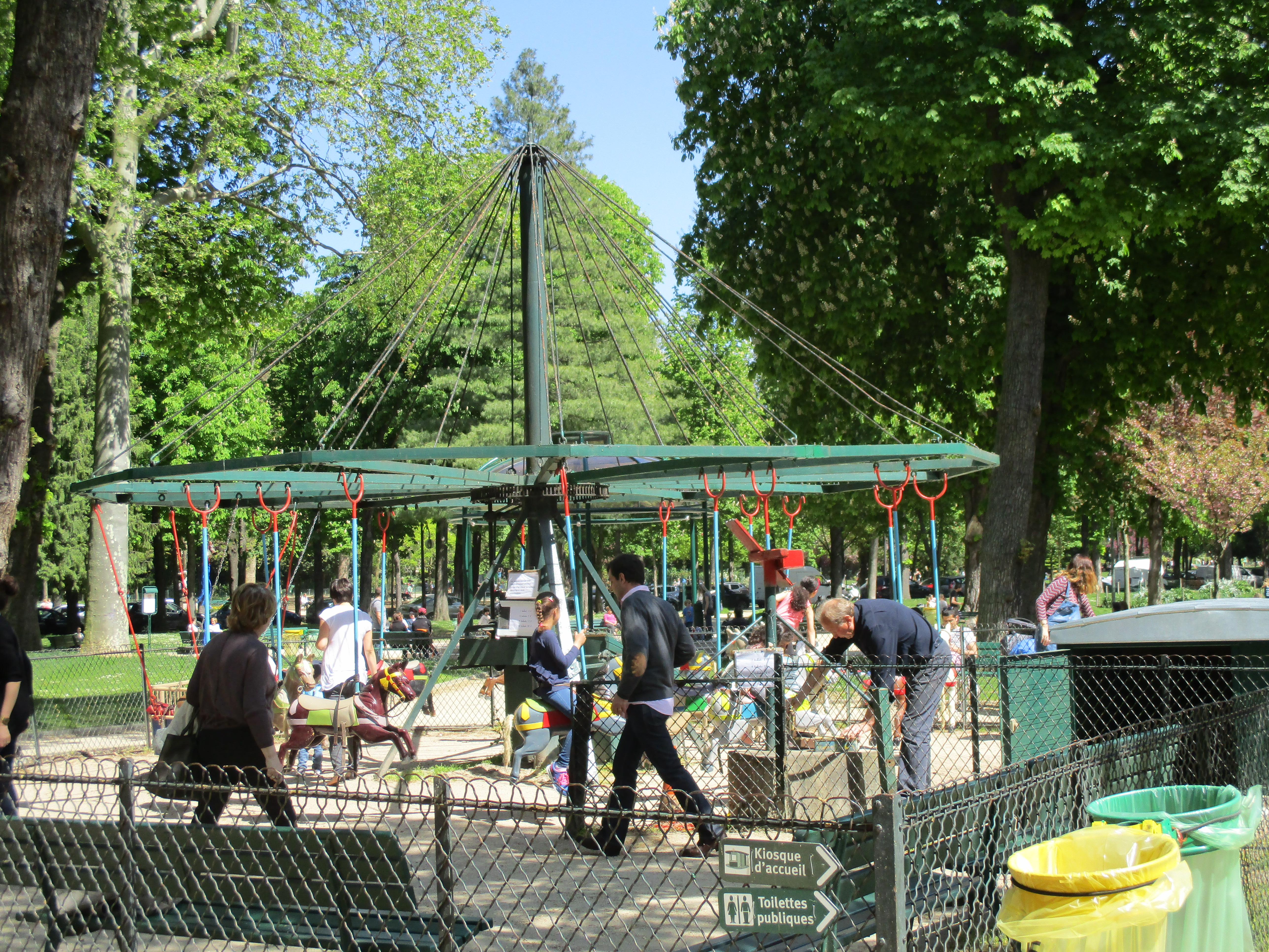 Le fameux manège aux anneaux du Jardin du Ranelagh.